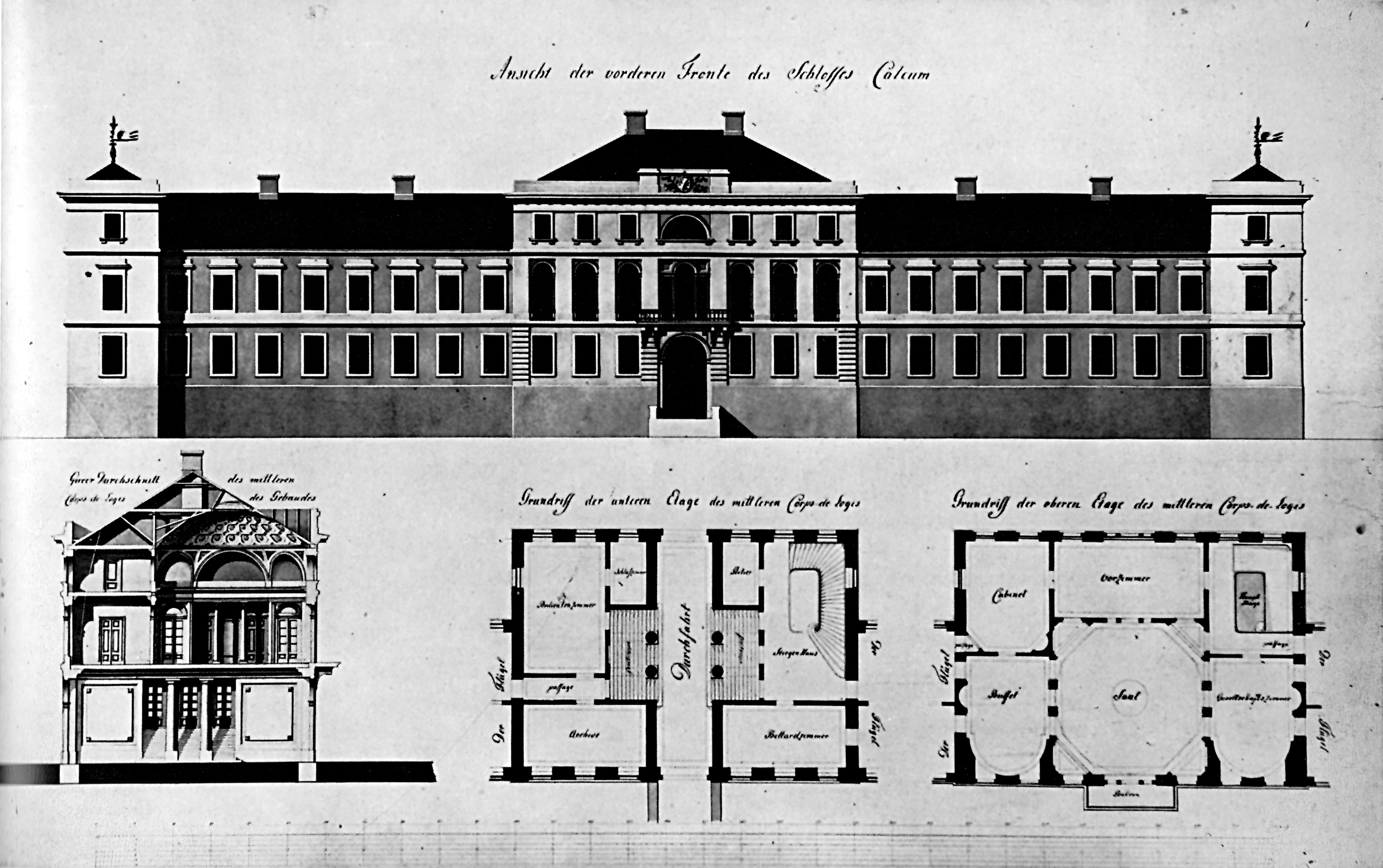 Gestaltungsvorschlag für den westlichen Mittelbau Schloss Kalkums